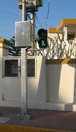 Semáforo peatonal en el cruce de las avenidas Colón y Cupules, en la ciudad de Mérida, Yucatán, México.